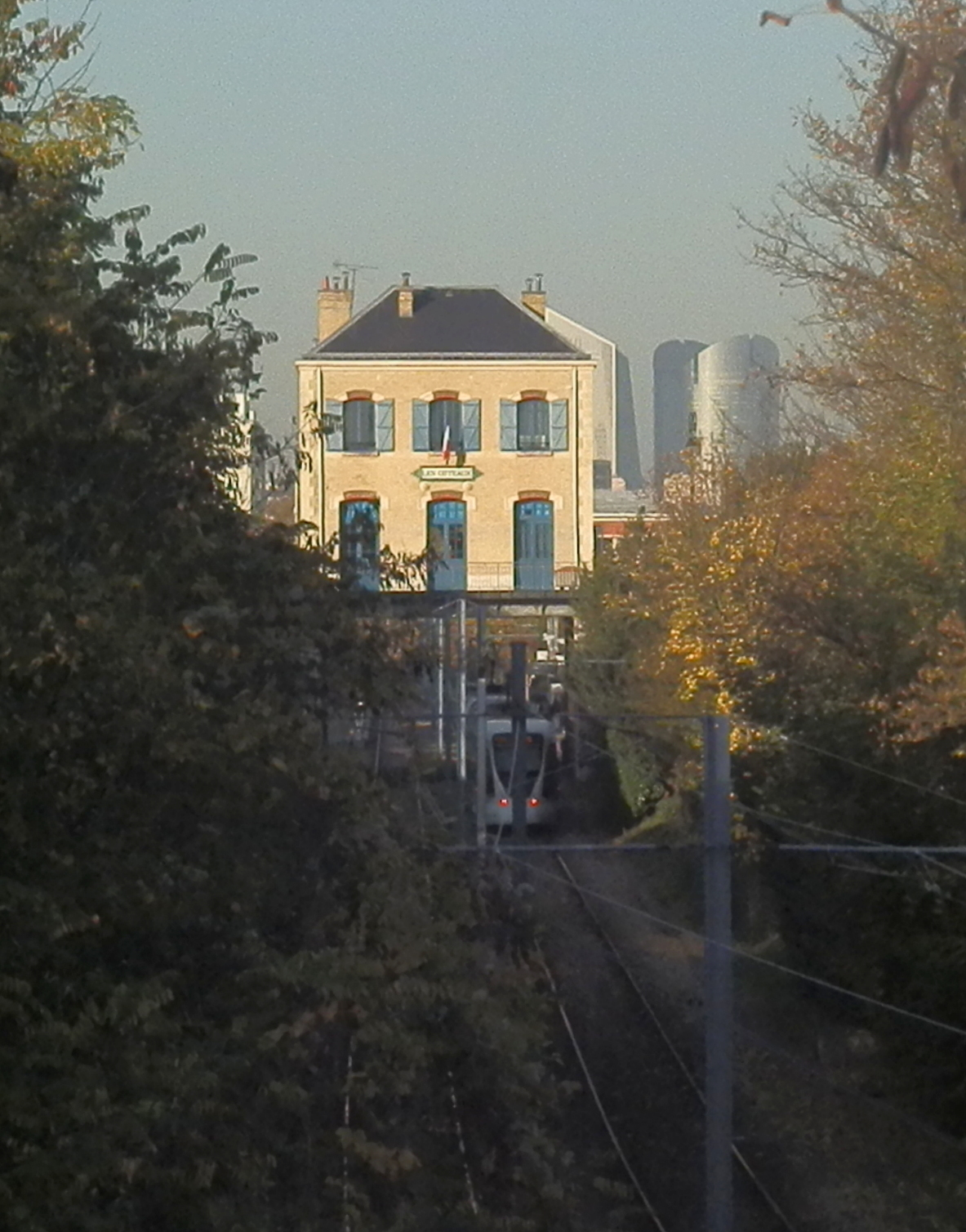 Vue de la Gare des Coteaux à partir du Pont Sénard le long de la voie verte, à Saint-Cloud, Hauts-de-Seine, France. En arrière-plan, les gratte-ciels de La Défense.